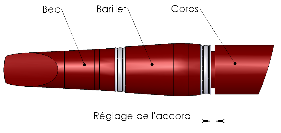 schema de l'accord d'une clarinette. Image obtenue à partir du modèle 3D réalisé sous Solidworks